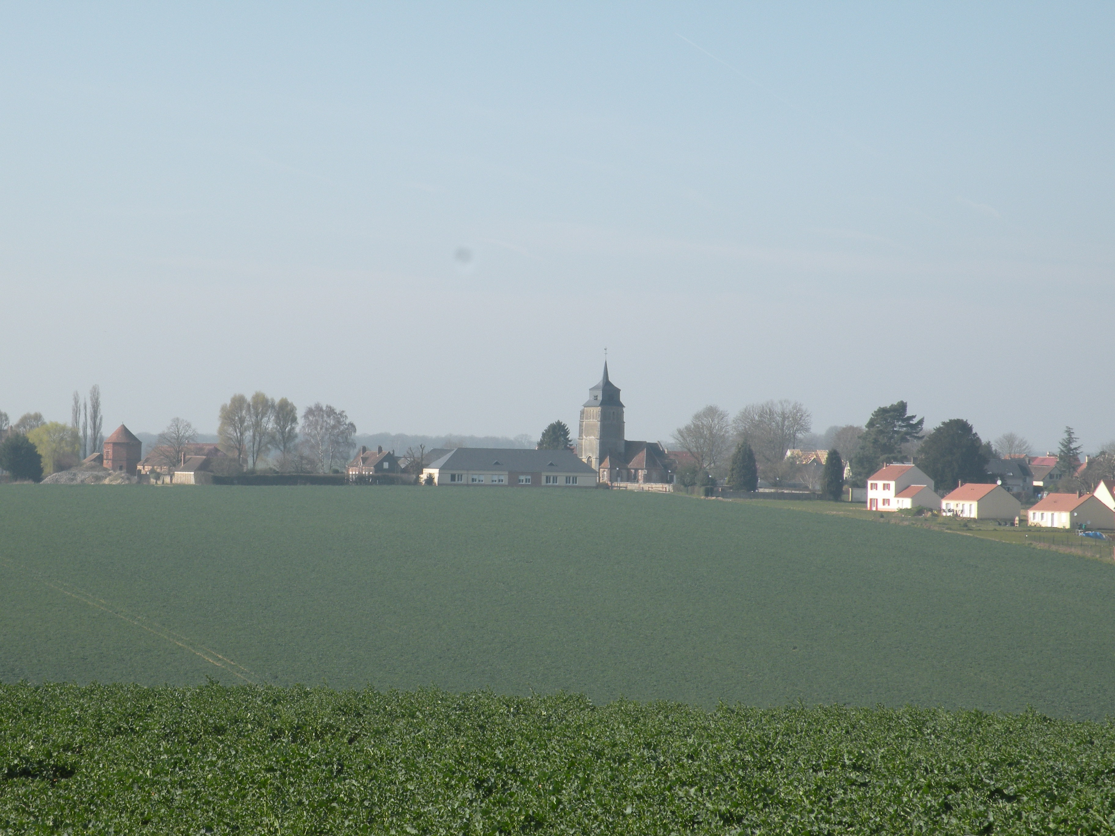 Porcheux vue